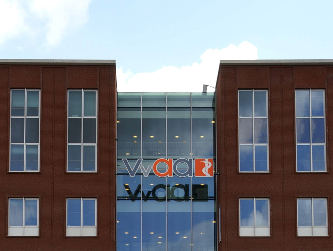 VvAA kantoor met logo